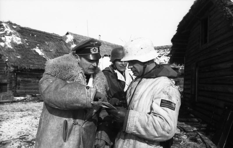 Kampf um die Versorgungsschneise Deutsche Panzergrenadiere unter dem Befehl des Obersten Graf von Strachwitz, Träger des höchsten deutschen Ordens, traten zum Gegenstoss an, um einen vorspringenden Frontabschnitt der Bolschewisten zu beseitigen. Offiziere berichten dem Oberst über den Kampfverlauf. PK:Utecht [HG Nord, Frühjahr 1944]